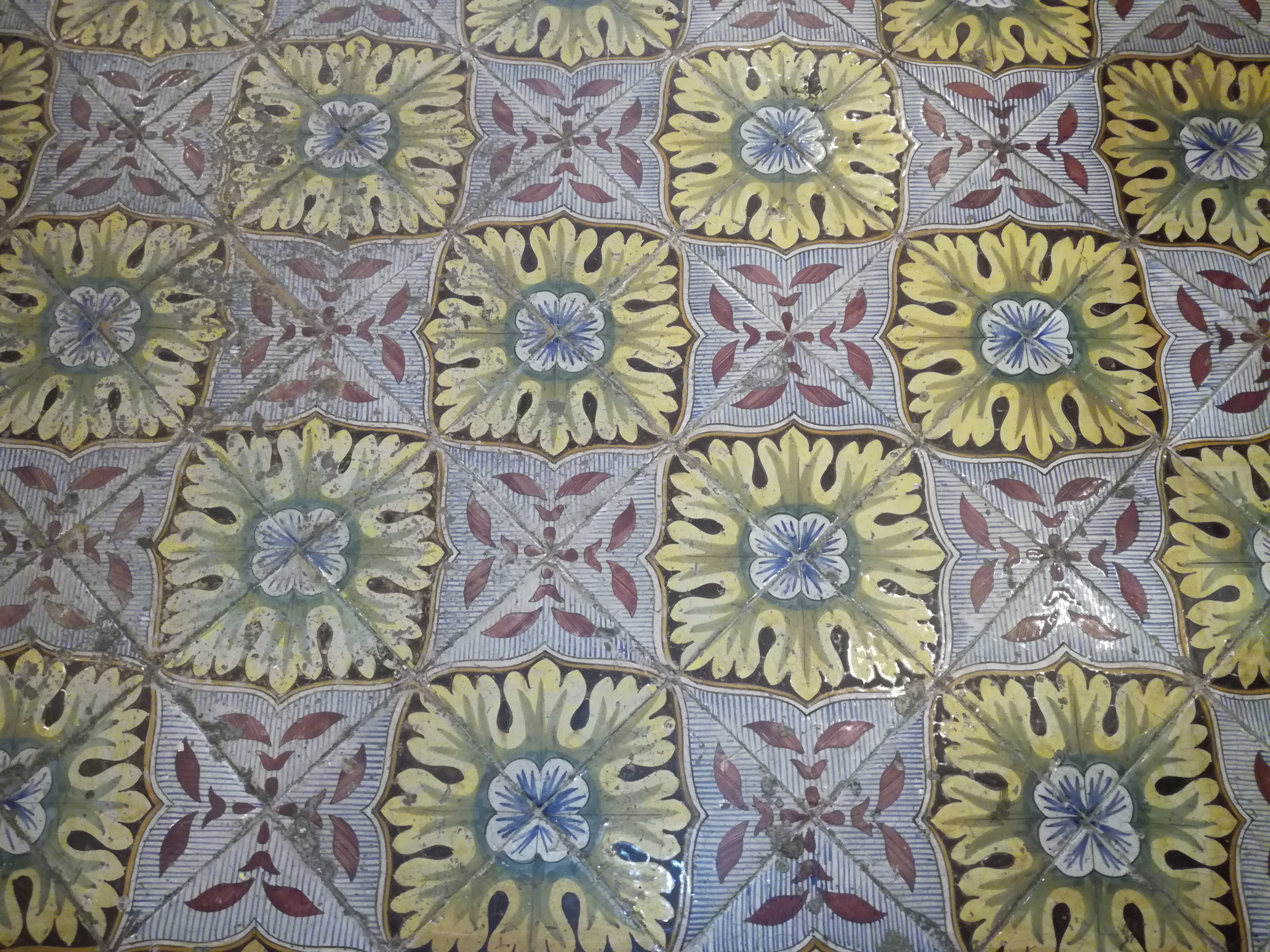 Maioliche Biagio Maggiore